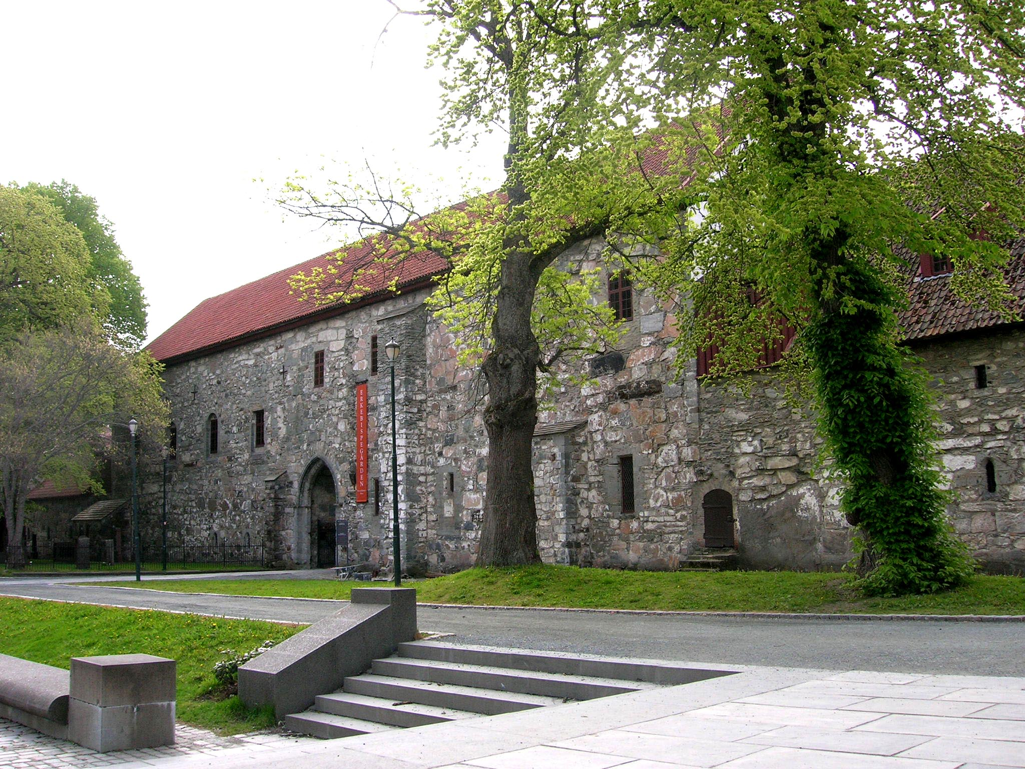 Bëschofspalais vun Trondheim (2006)